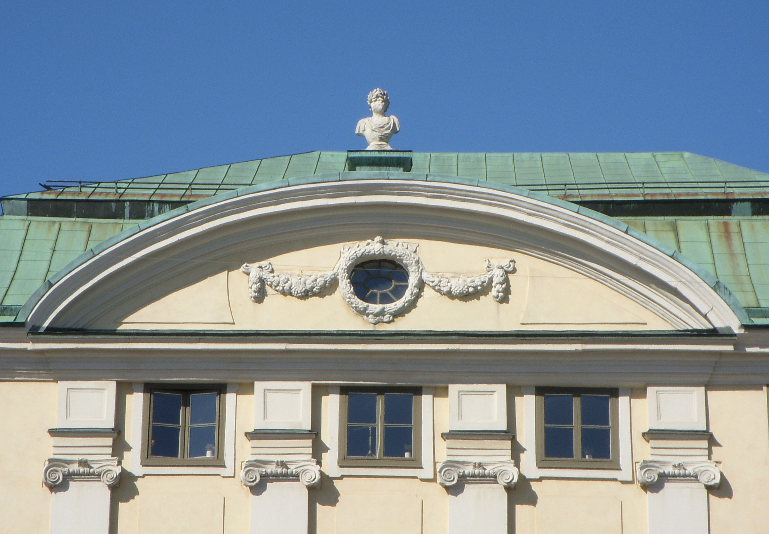 Skeppsbron 10, Stockholm, detalj